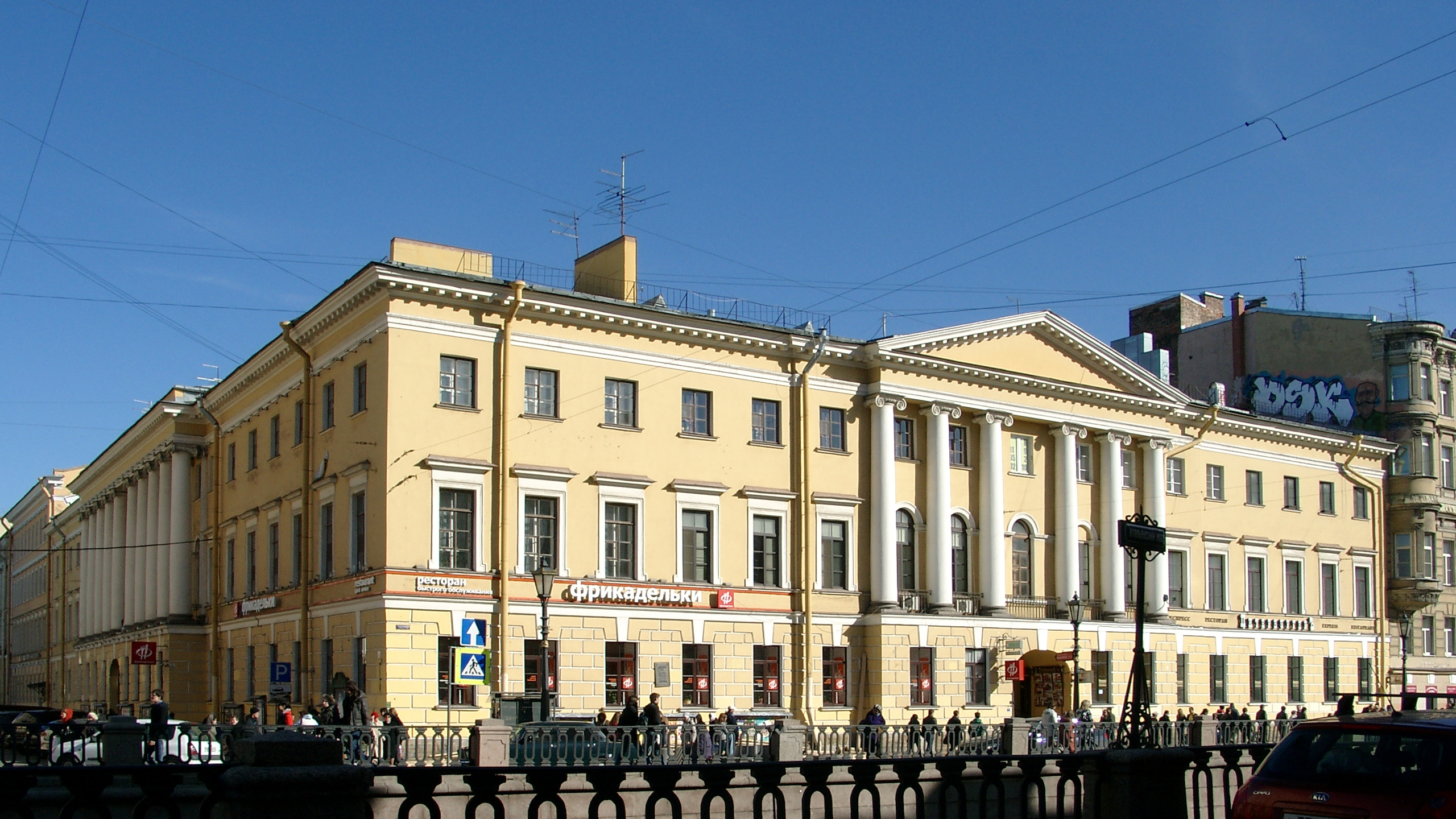 «Дом ордена иезуитов» в Санкт-Петербурге (наб. канала Грибоедова д. 8 / Итальянская ул., д. 1)